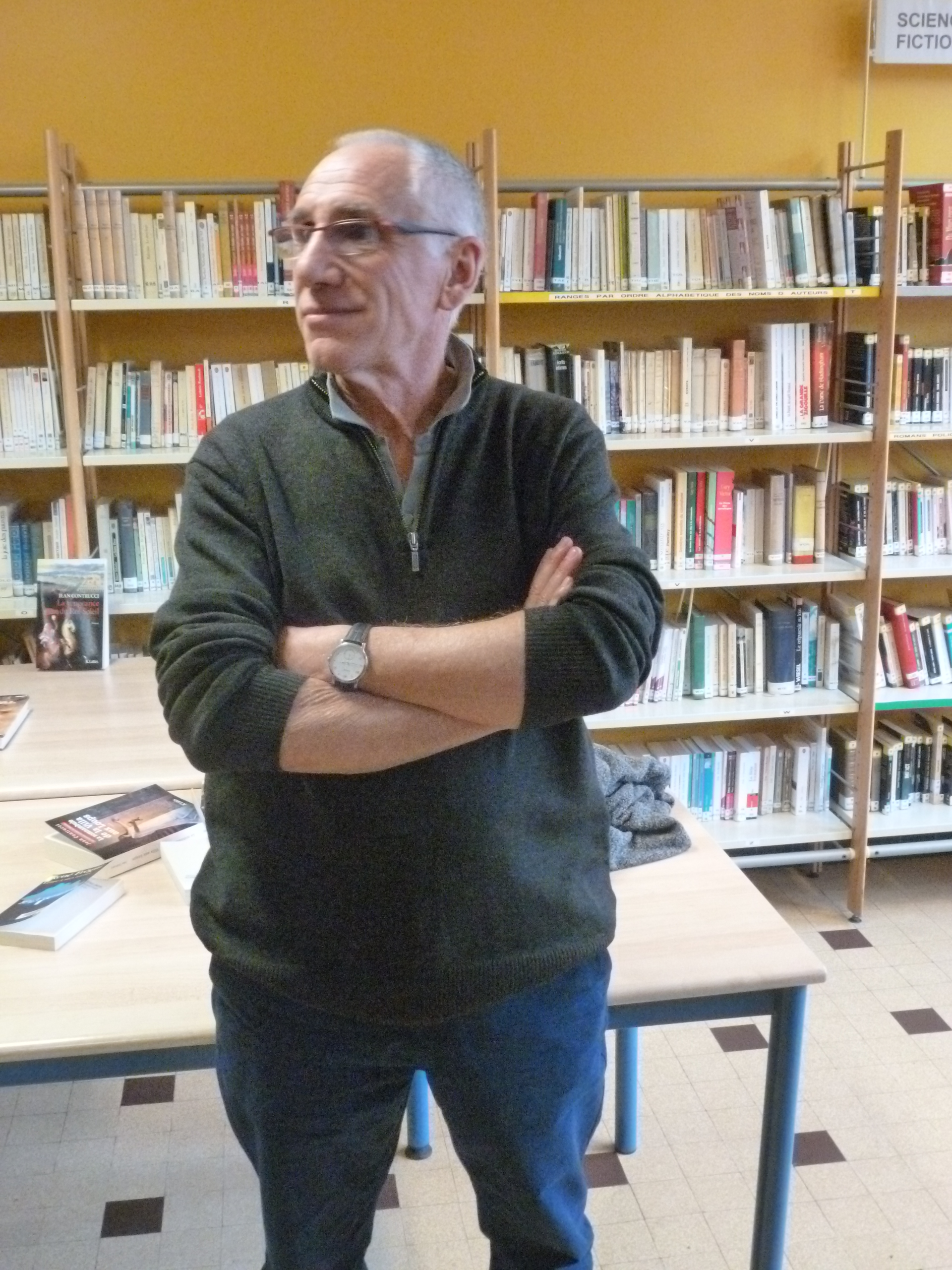 René Frégni au Lycée Langevin à Martigues